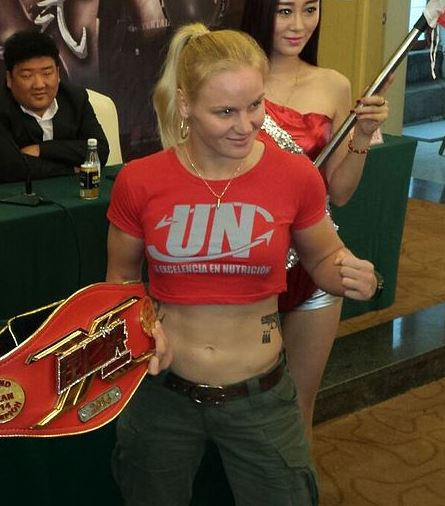 ולנטינה שבשנקו - אמנית לחימה קירגיסטנית-פרואנית